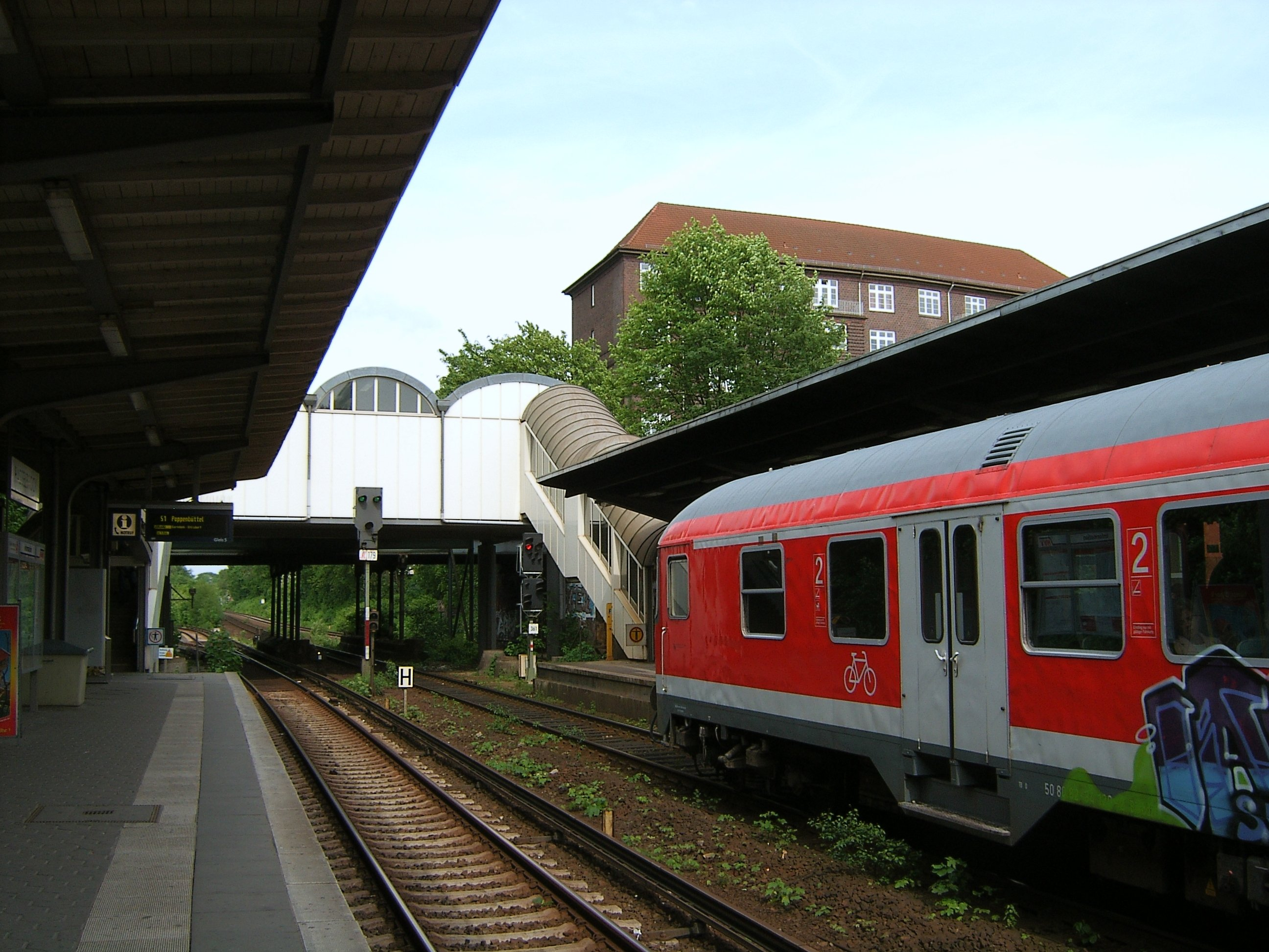 S-Bahnhof Hasselbrook in Eilbek.